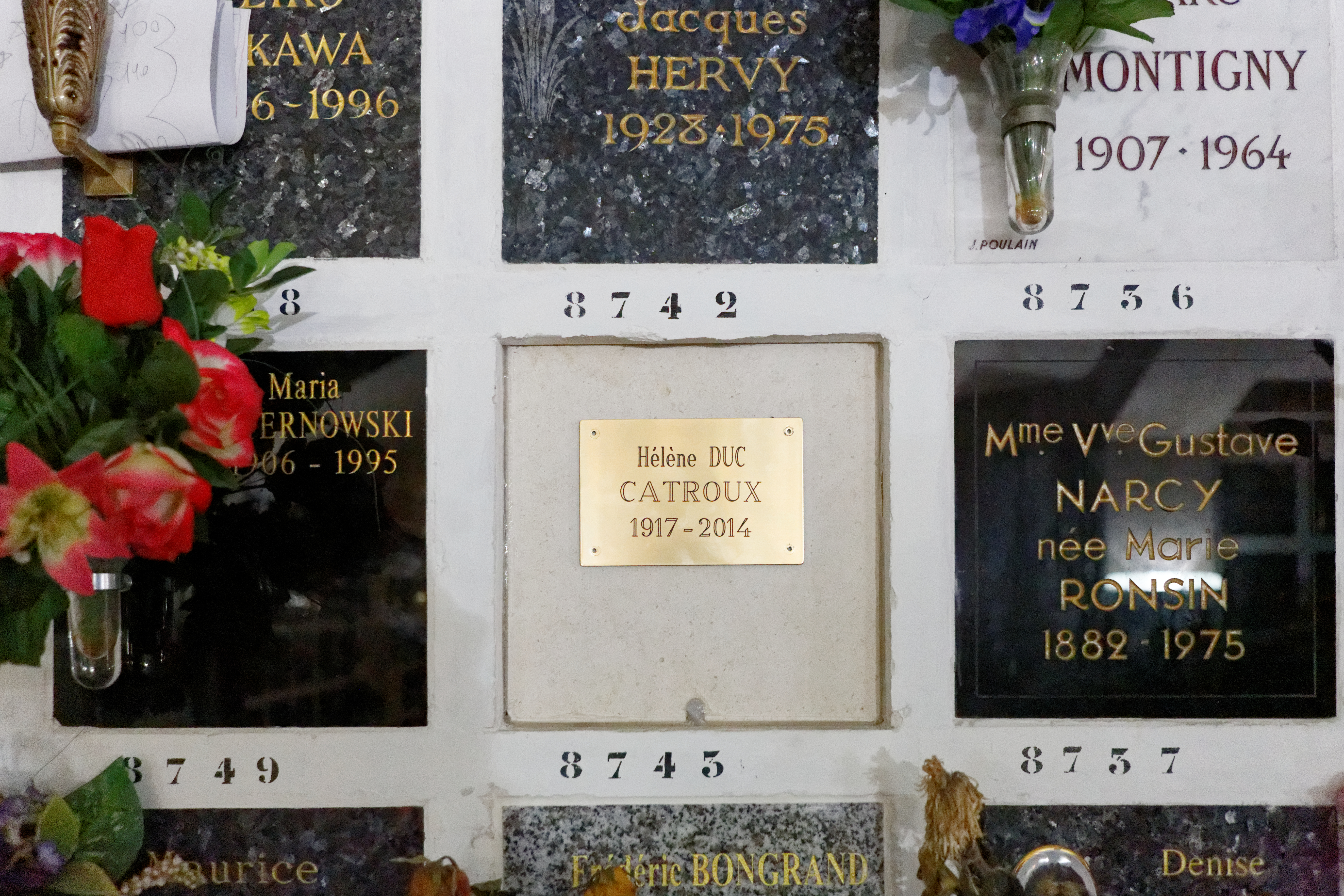 Sépulture d'Hélène Duc, comédienne et tragédienne française de théâtre, de cinéma, de télévision et de la Radiodiffusion française puis de France Culture et Radio France.